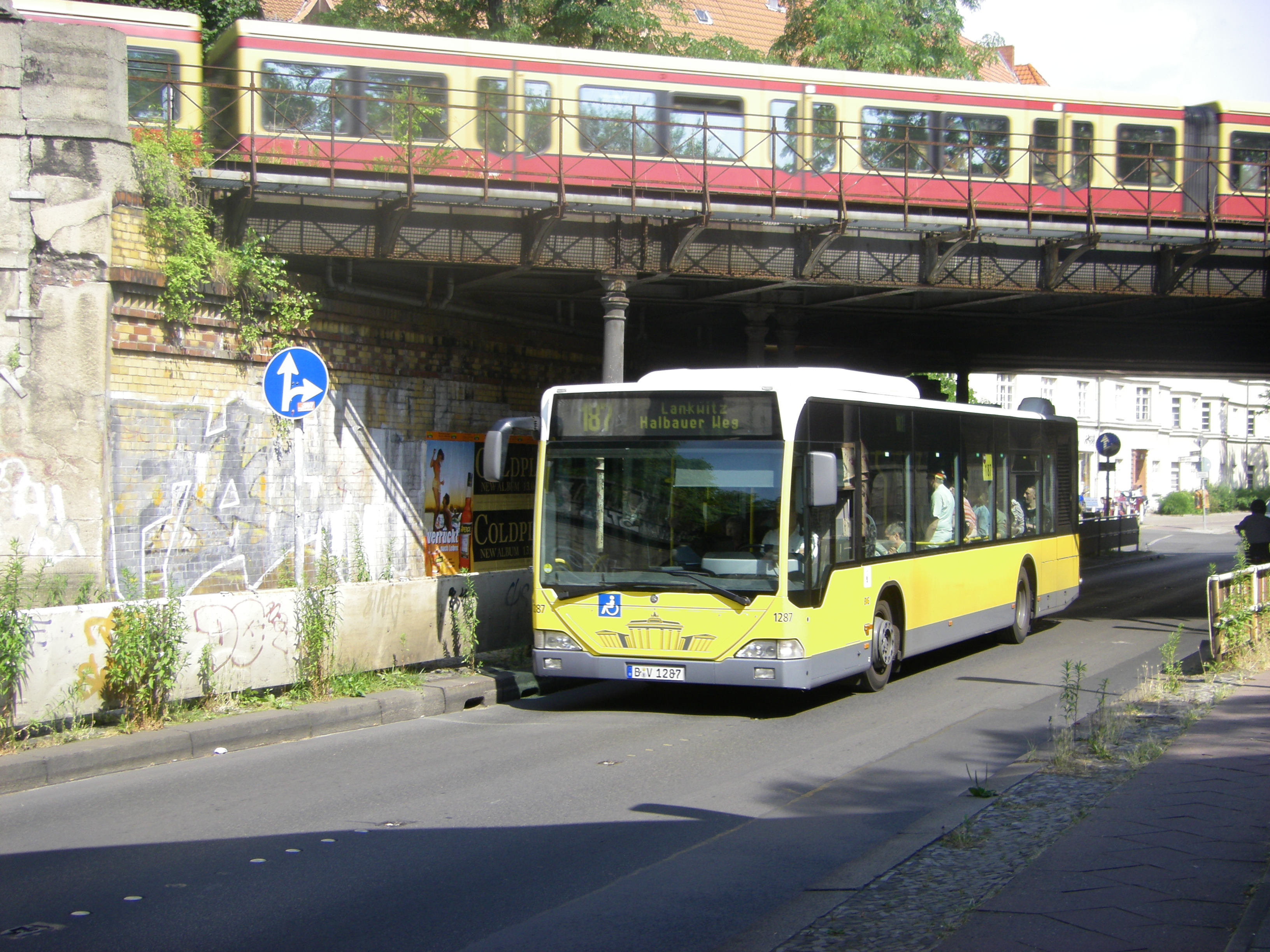 Berlin-Schöneberg Rubensstrasse